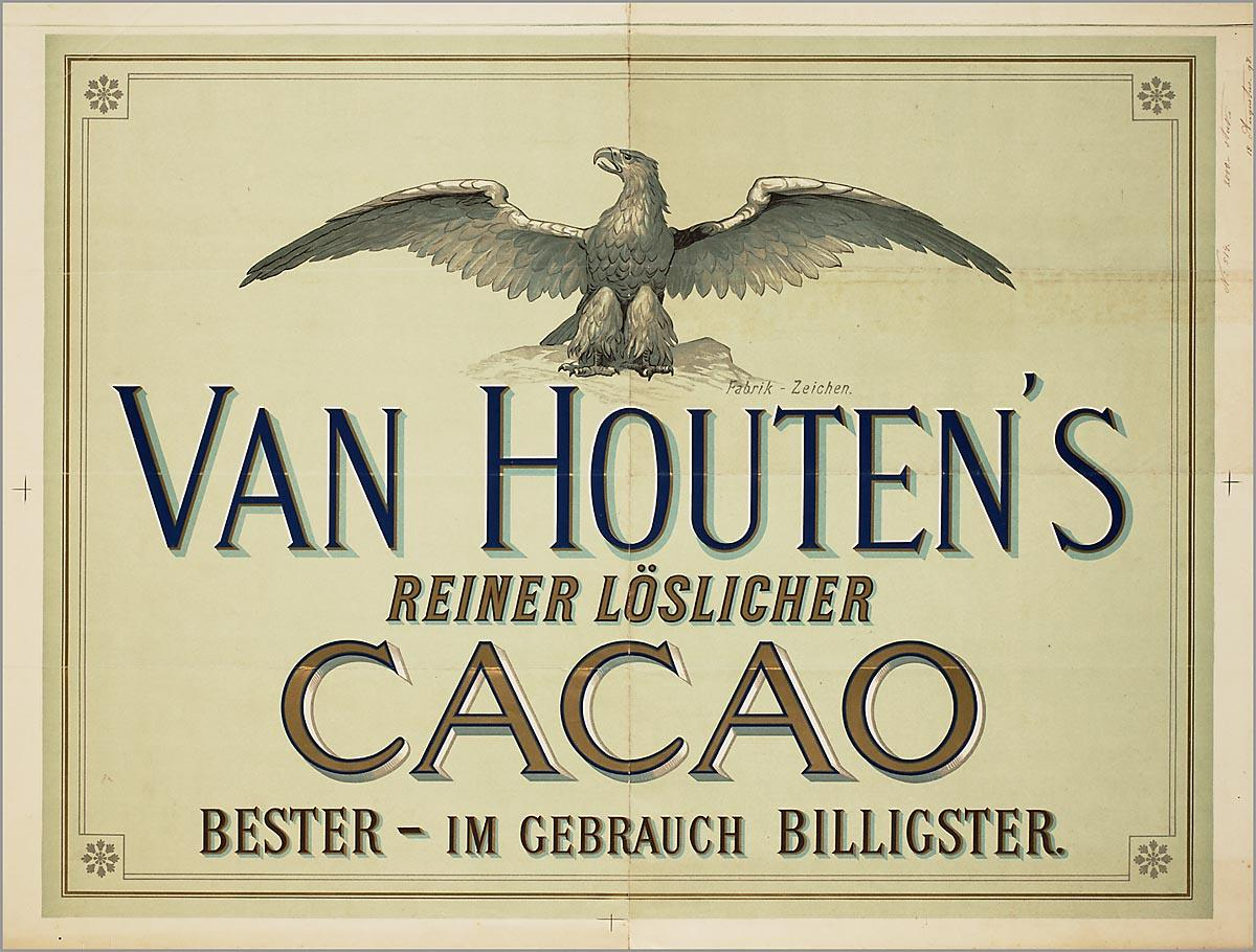 Affiche: Van Houten's reiner löslicher Cacao. Bester - im Gebrauch billiger.